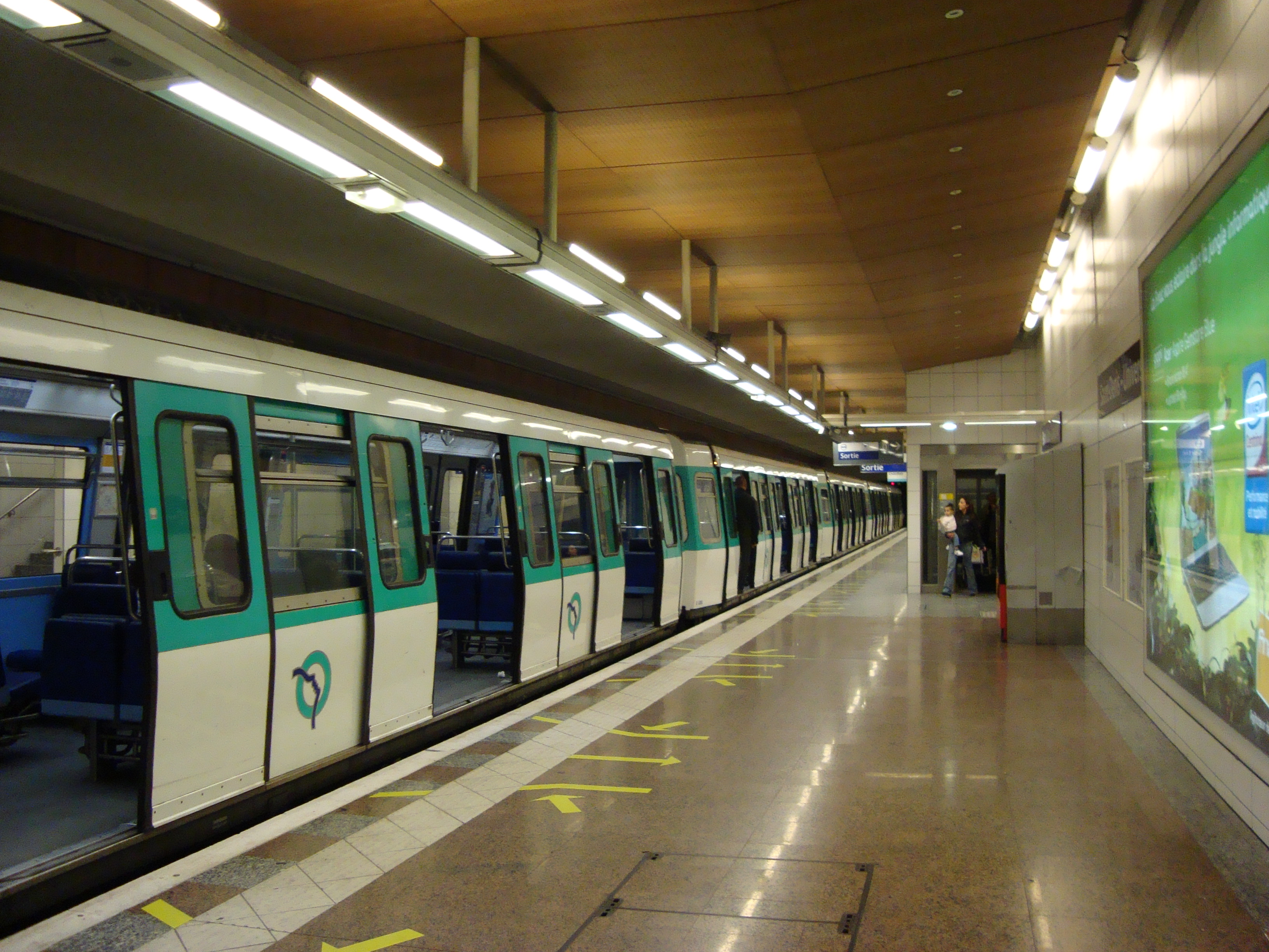 Rame de métro à quai au terminus de la ligne 13 du métro parisien à la station Saint-Denis Université.